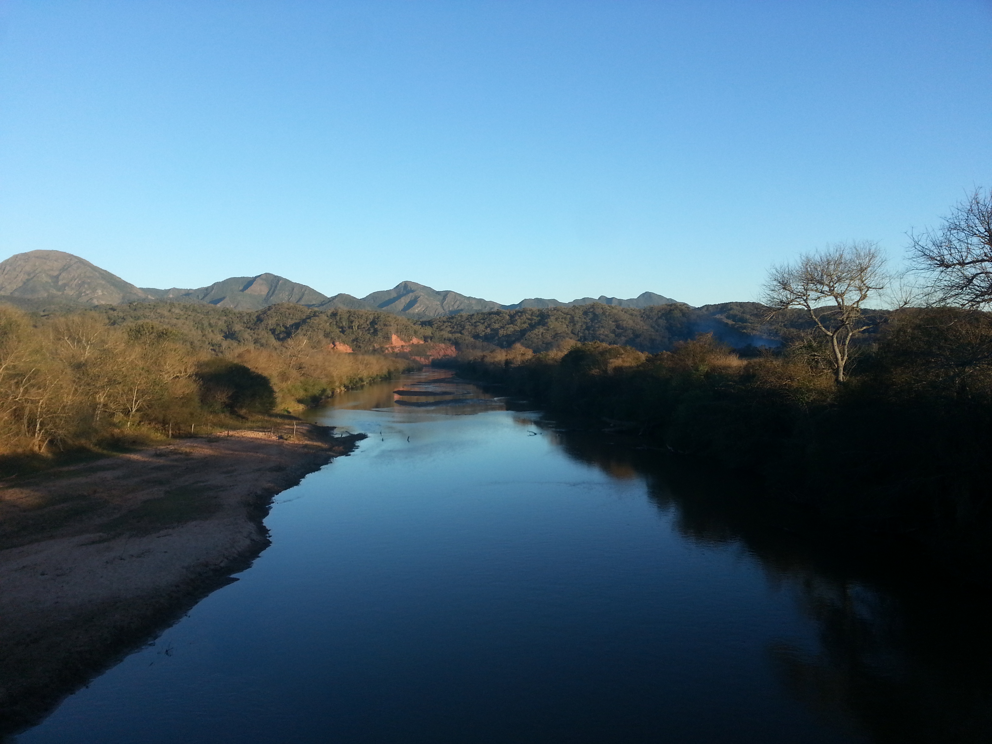 Vista sur del Río Salinas desde el puente El Vado de los Tacos